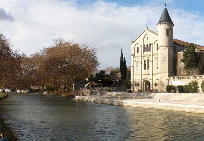 Ventenac-en-Minervois